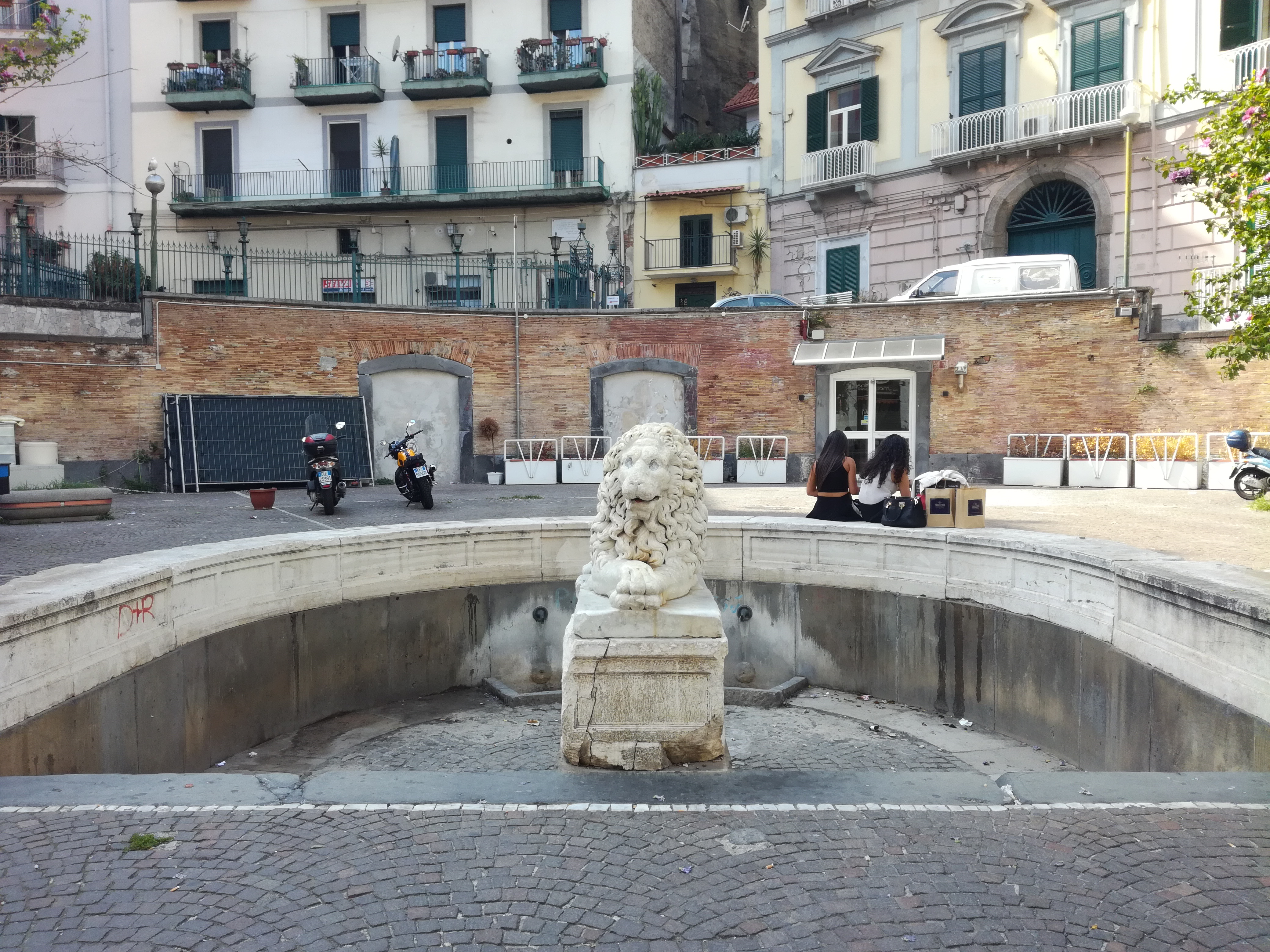 Fontana del Leone, Napoli, Italia